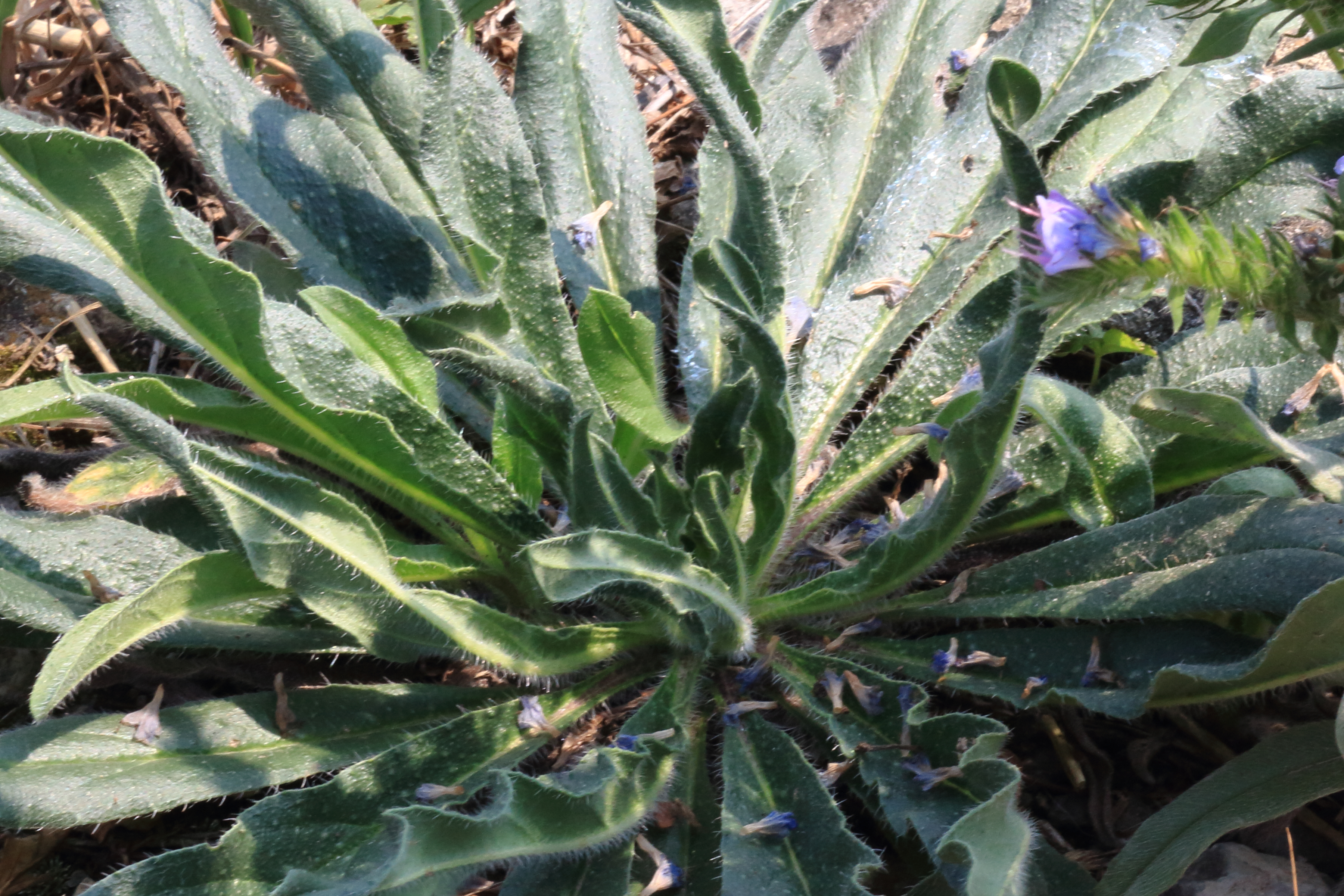 Gewöhnlicher Natternkopf Echium vulgare